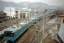 国鉄曽根駅201系試運転電車（御着折り返し）が通過中、貨物ホームの跡が見える。（1984年頃）※高解像度版は後日スキャンします。